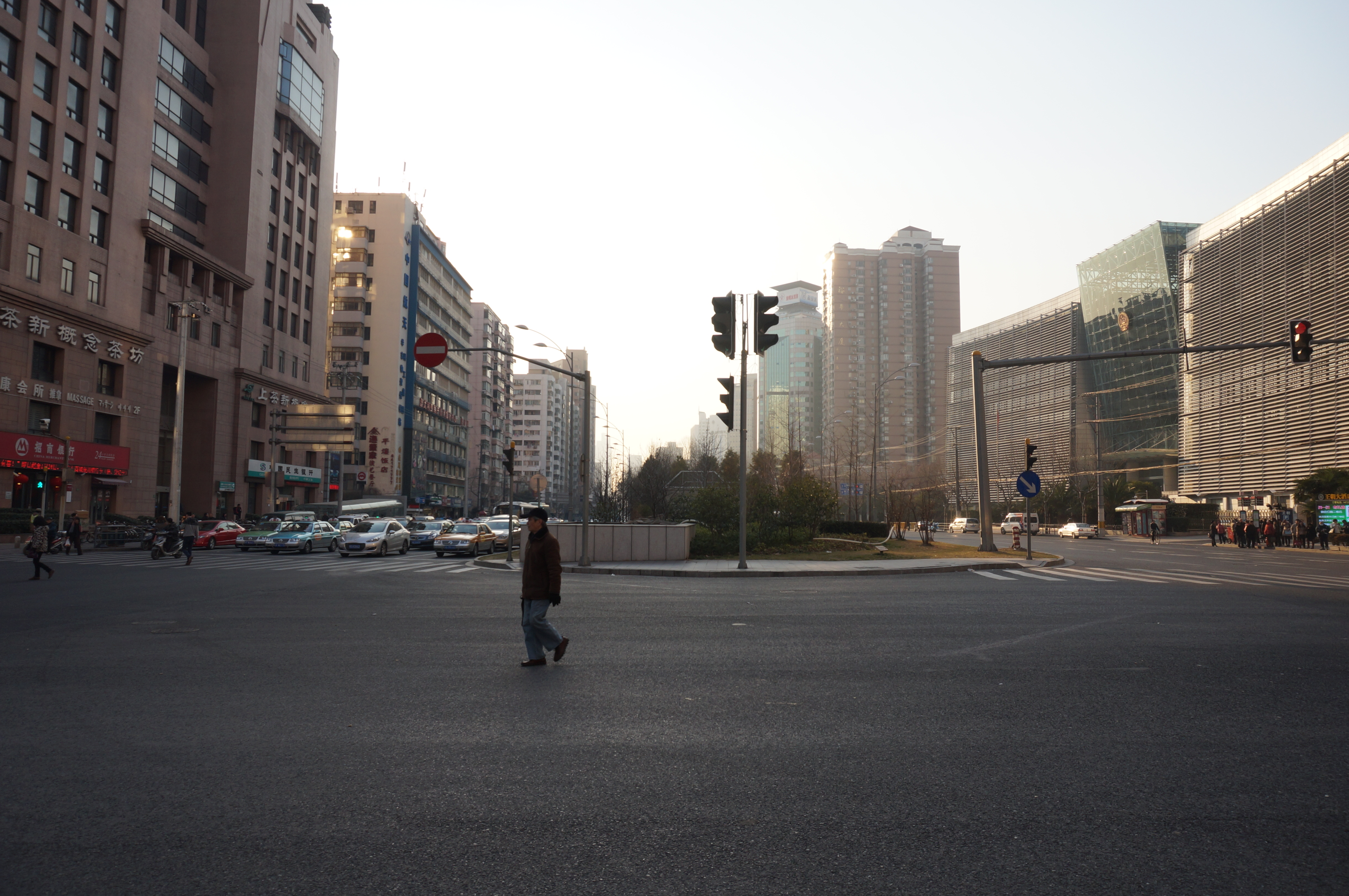 中文（中国大陆）: 上海肇嘉浜路街景